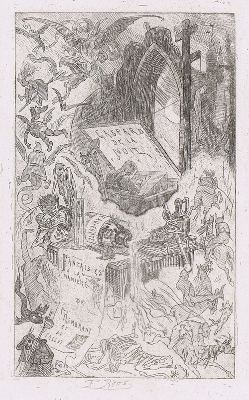 Frontispice pour l'édition de 1868 de "Gaspard de la Nuit" d'Aloysius Bertrand